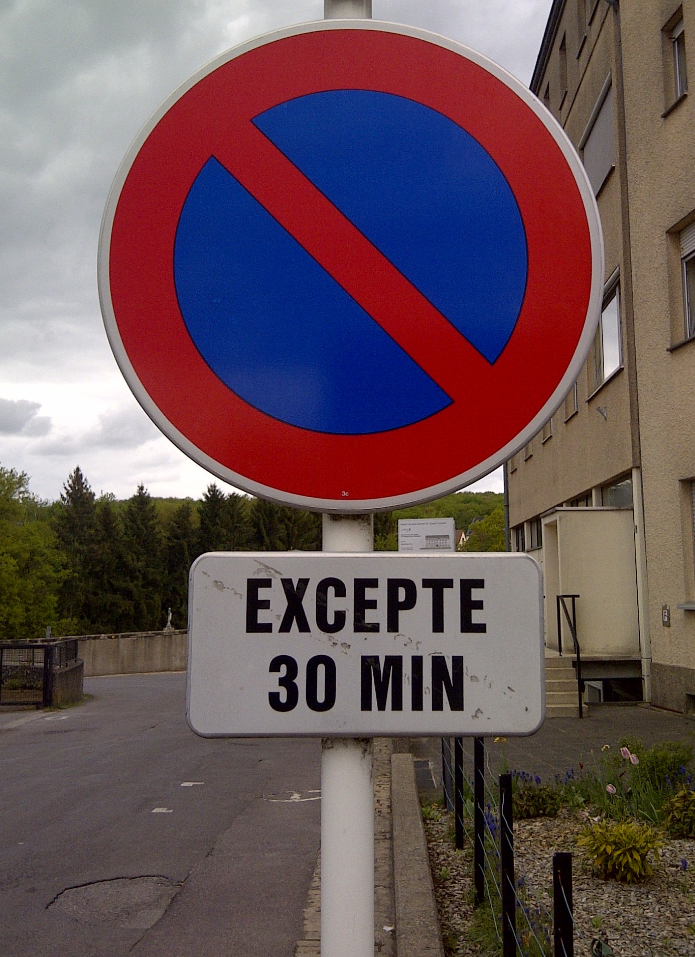 Verkéiersschëld C,18 aus dem Lëtzebuerger Code de la route mam Zousazschëld Modell 7d